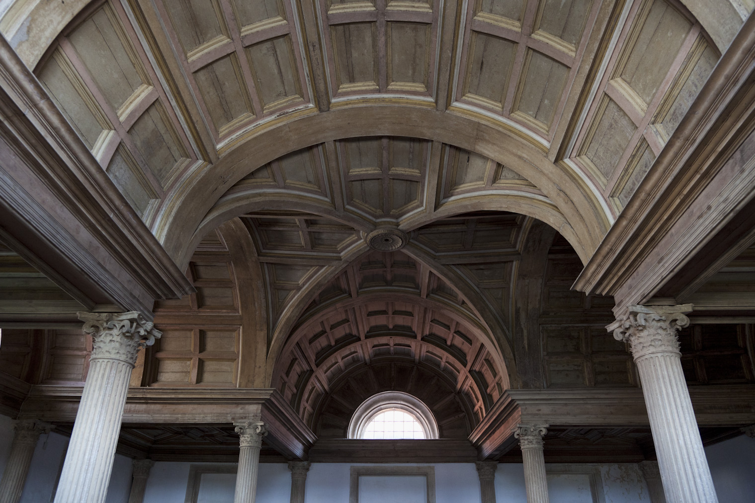 João de Castilho, Capela do Noviciado, Convento de Cristo